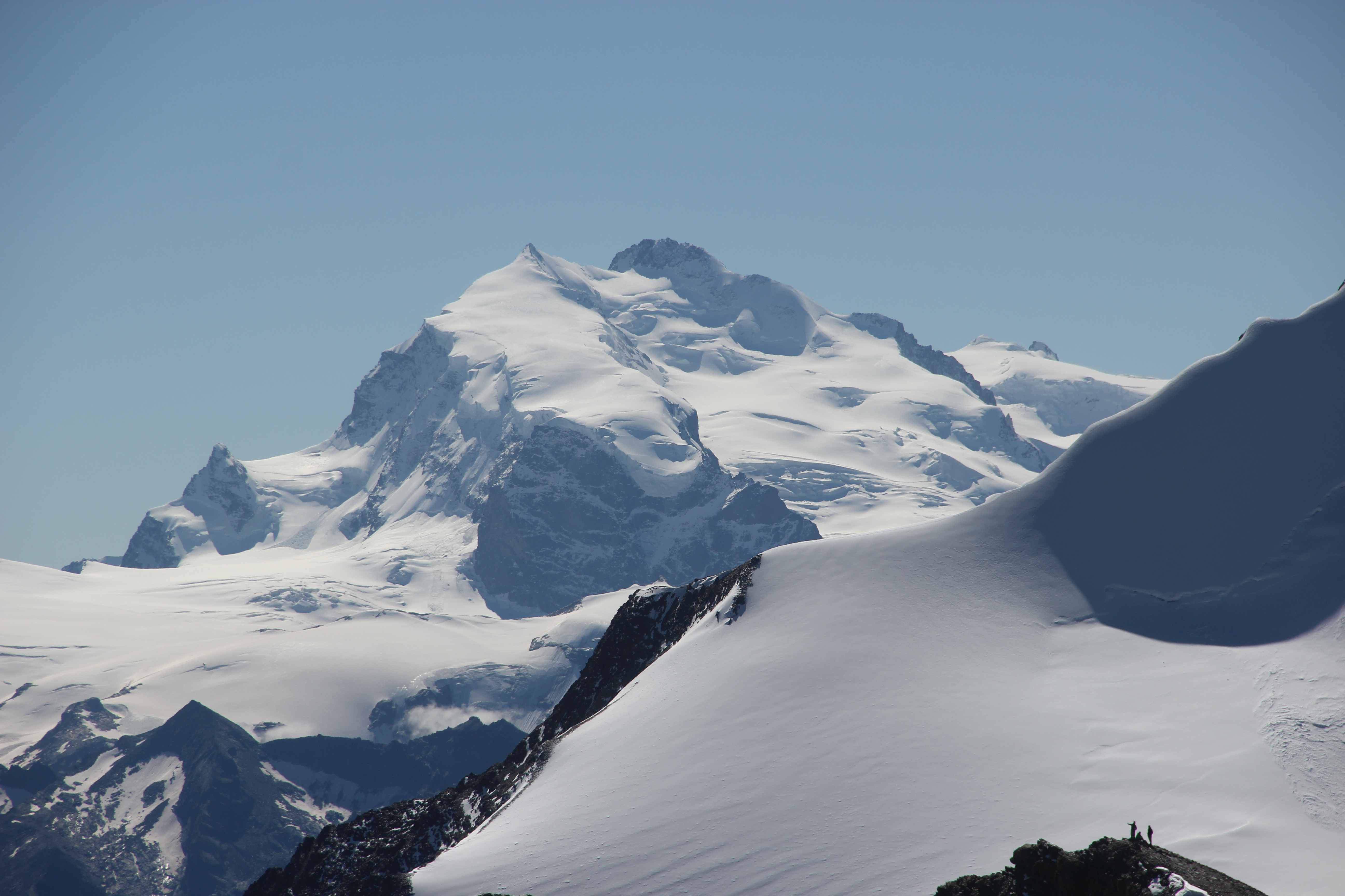 Nordend and Dufourspitze